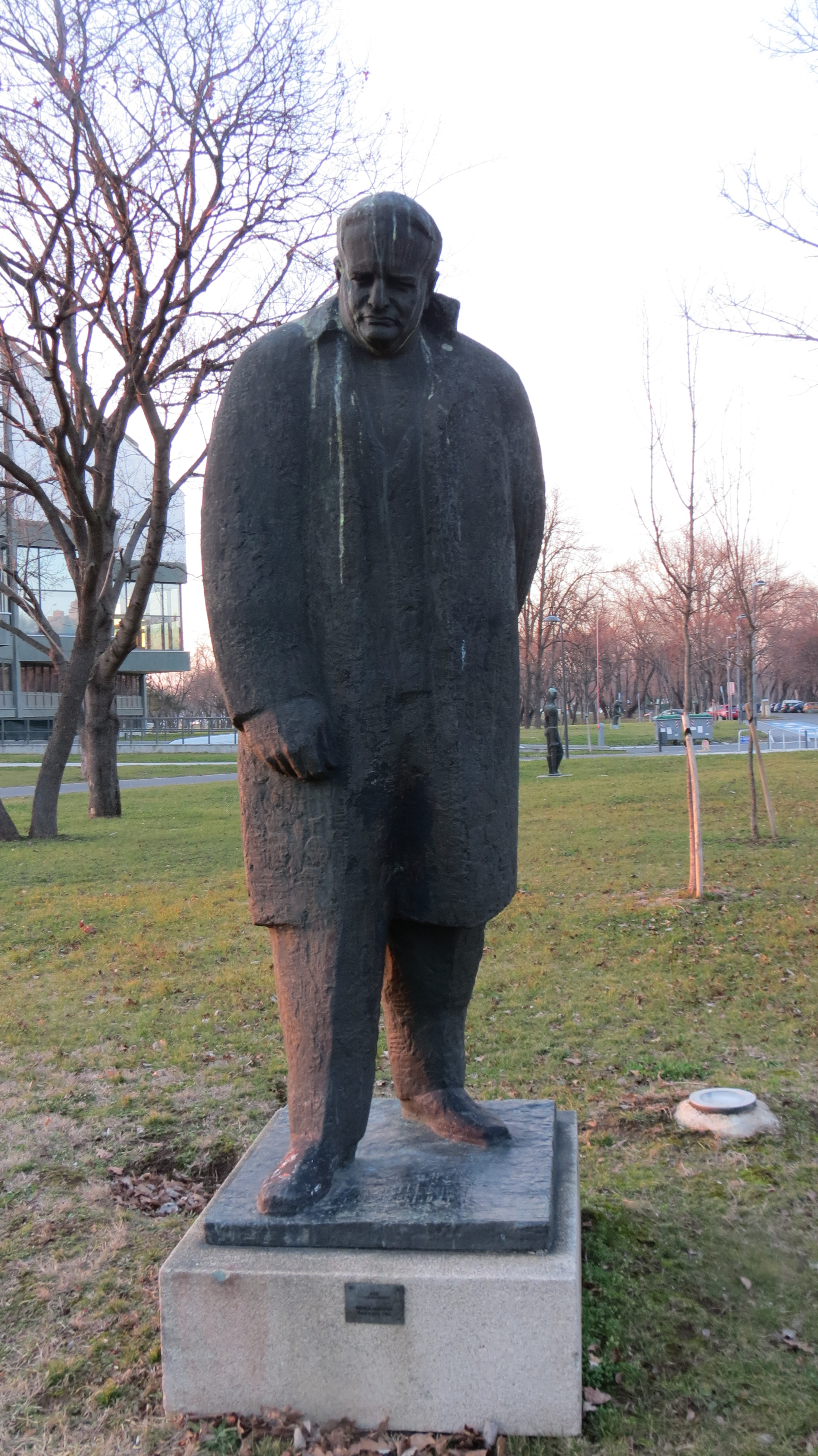 Srpski (latinica): Spomenik Borisu Kidriču u Beogradu, u parku oko Muzeja savremene umetnosti, prednja strana